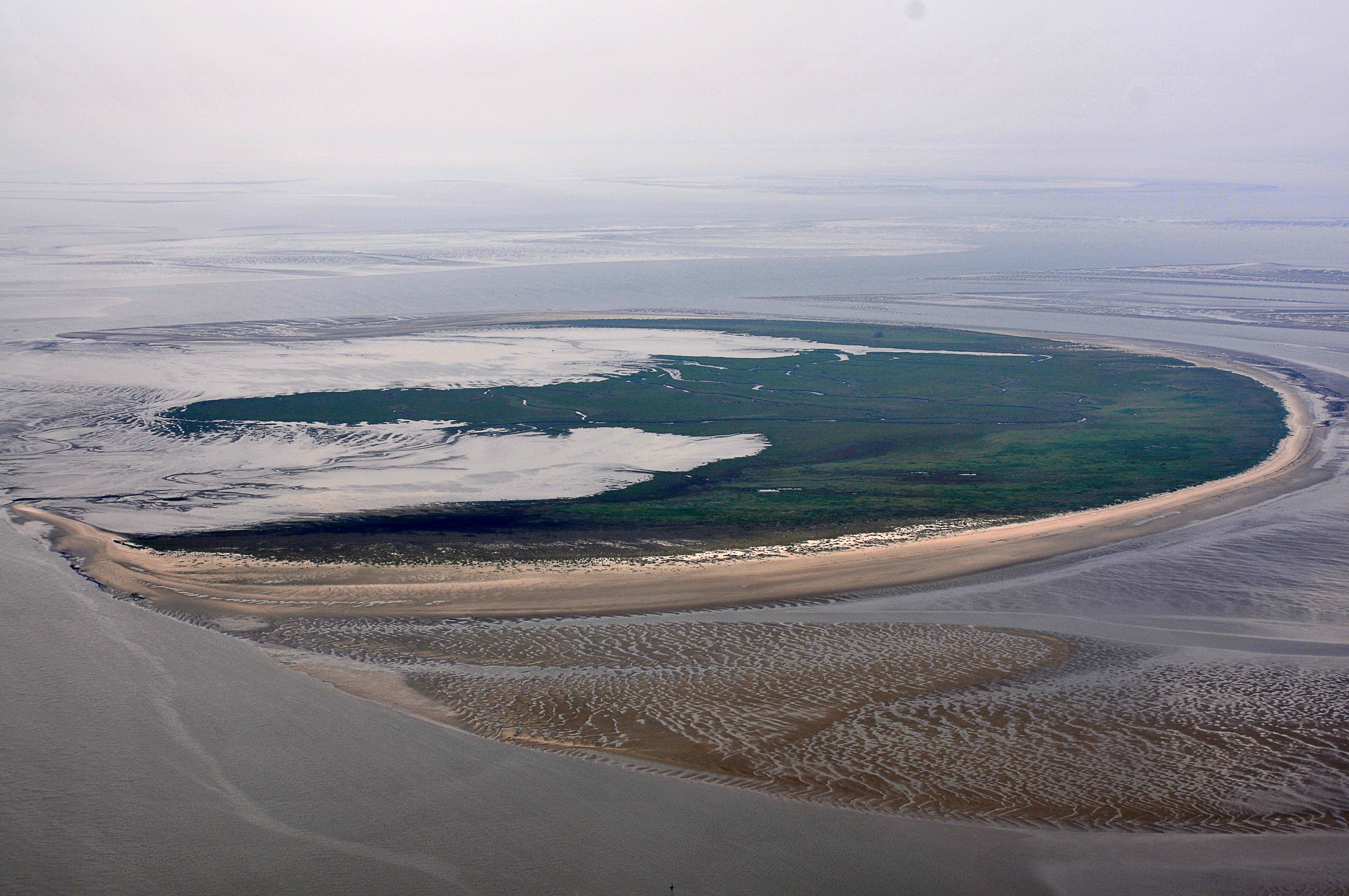 Fotoflug Nordsee, Trischen